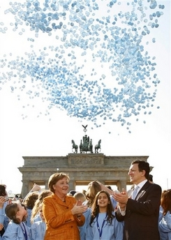 Merkel und Barrosso